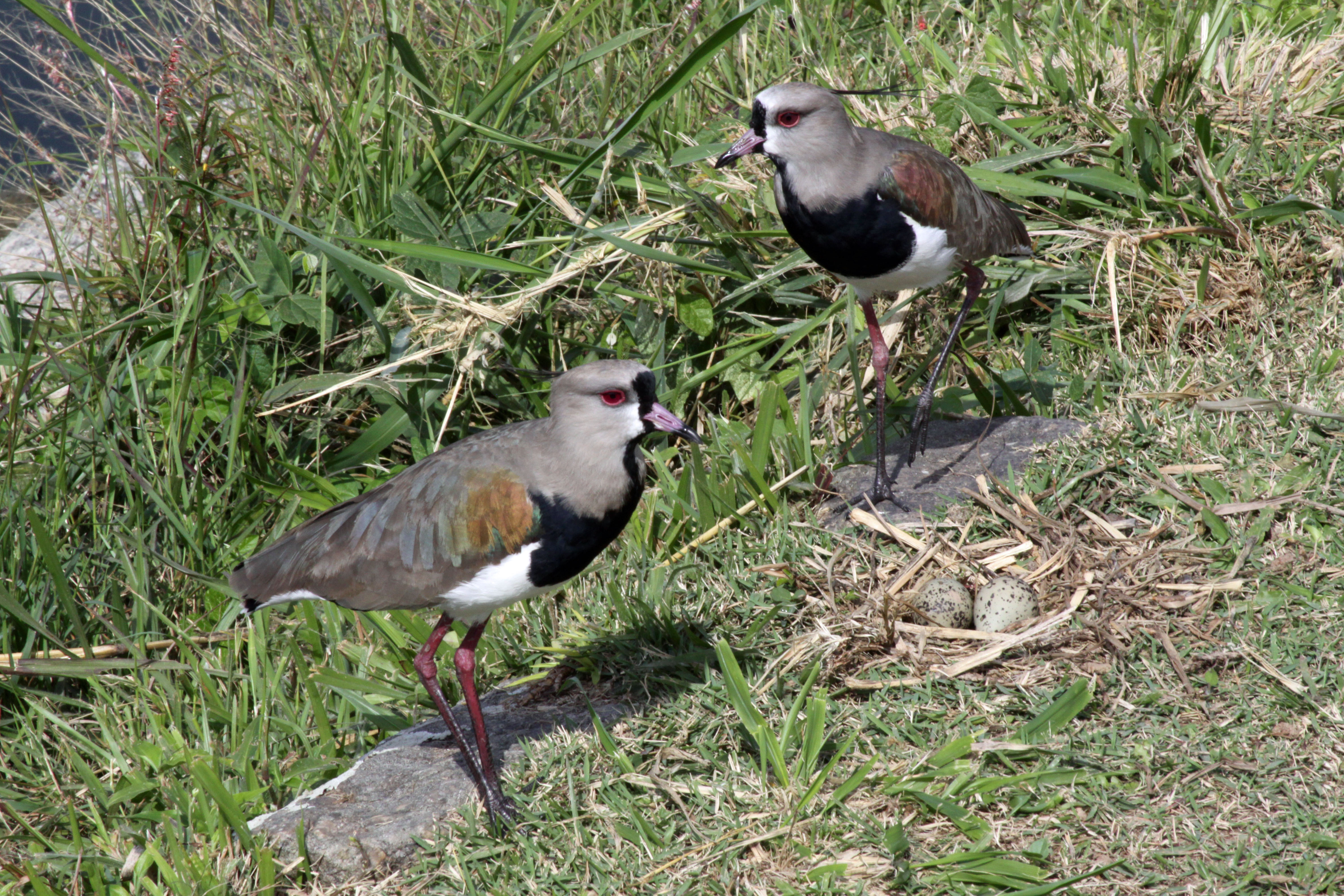 Quero-quero (Vanellus chilensis) tomando conta dos ovos.